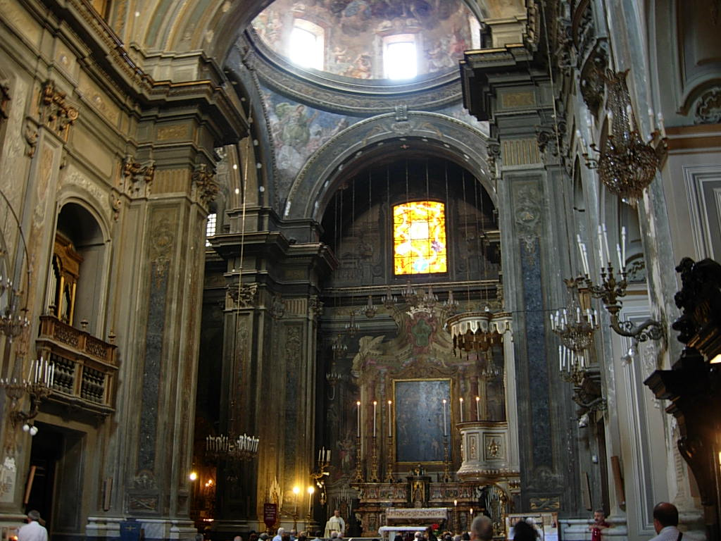 Chiesa di Santa Brigida in Napoli Foto personale Concesso in Pubblico Dominio